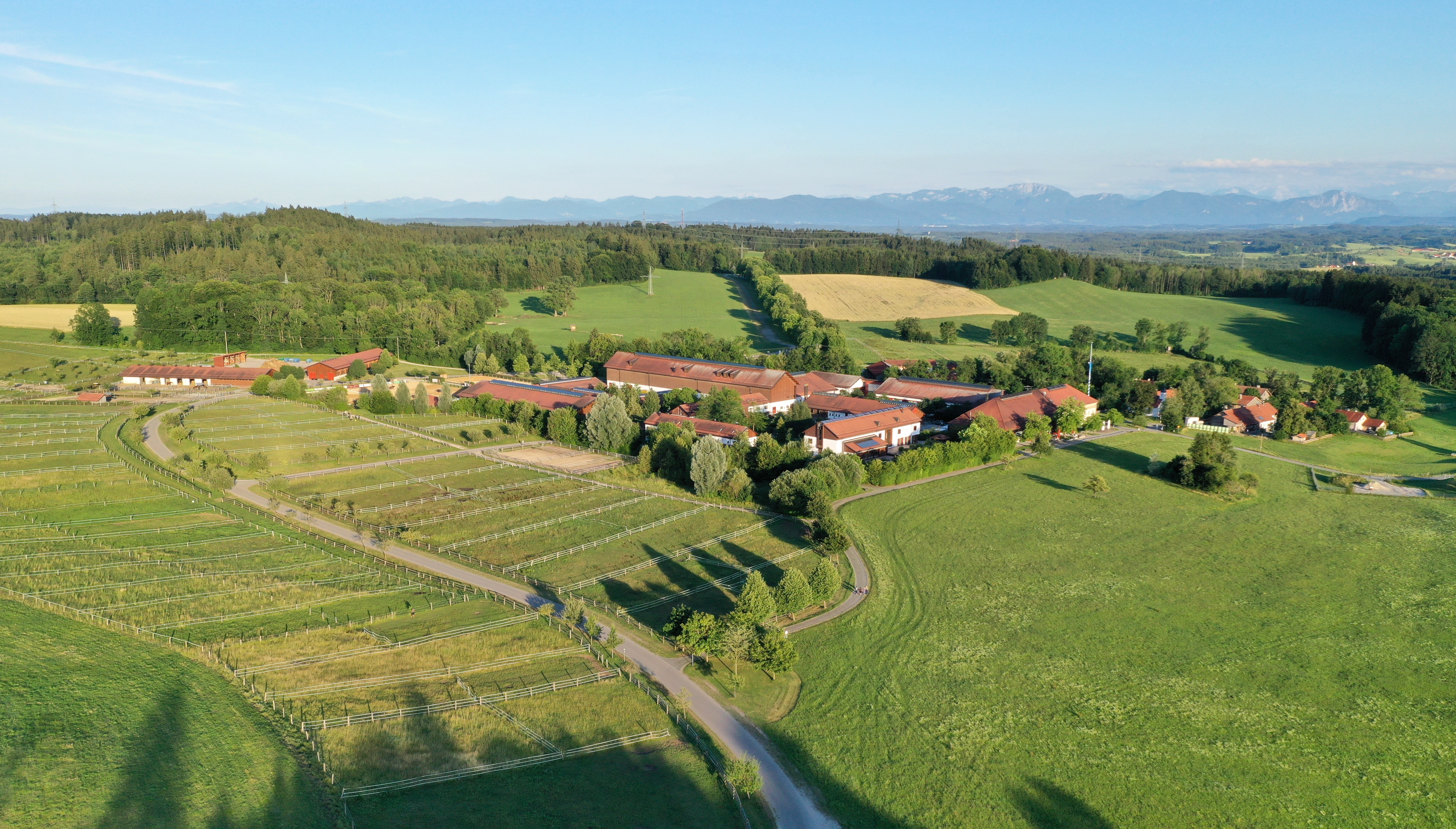 Das Gut Kerschlach aus der Luft fotografiert, Blick von Nordwesten.